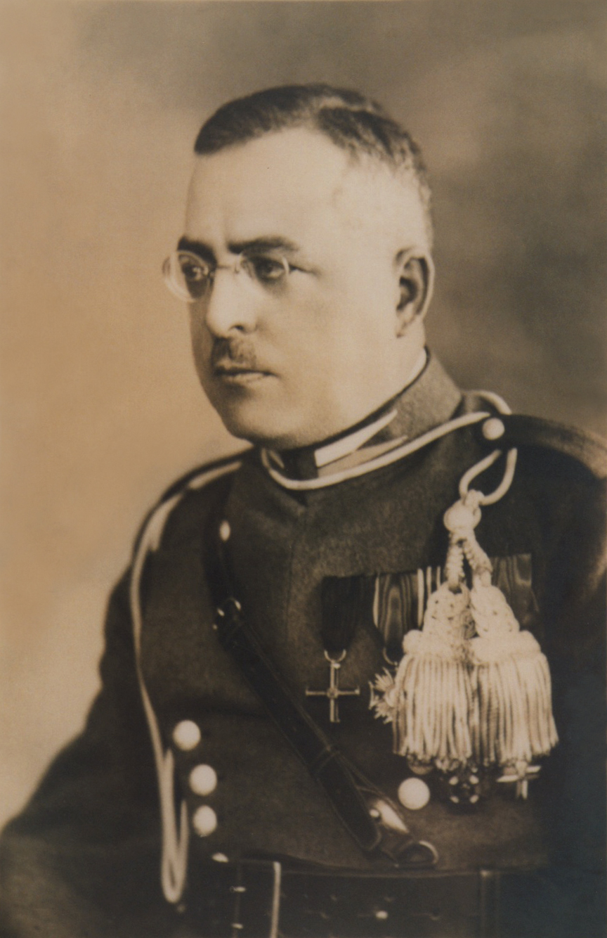 Edward Grabski w mundurze 17 Pulku Ulanów Wielkopolskich